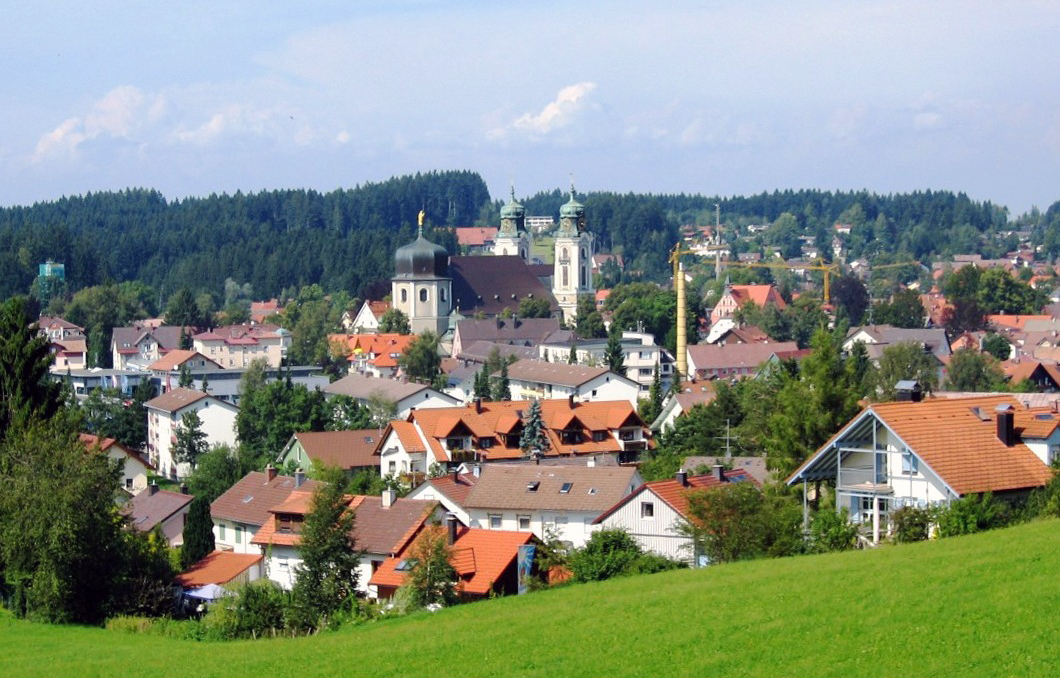 Lindenberg von Sydwesten fotografiert, Blick vom Bergfriedhof